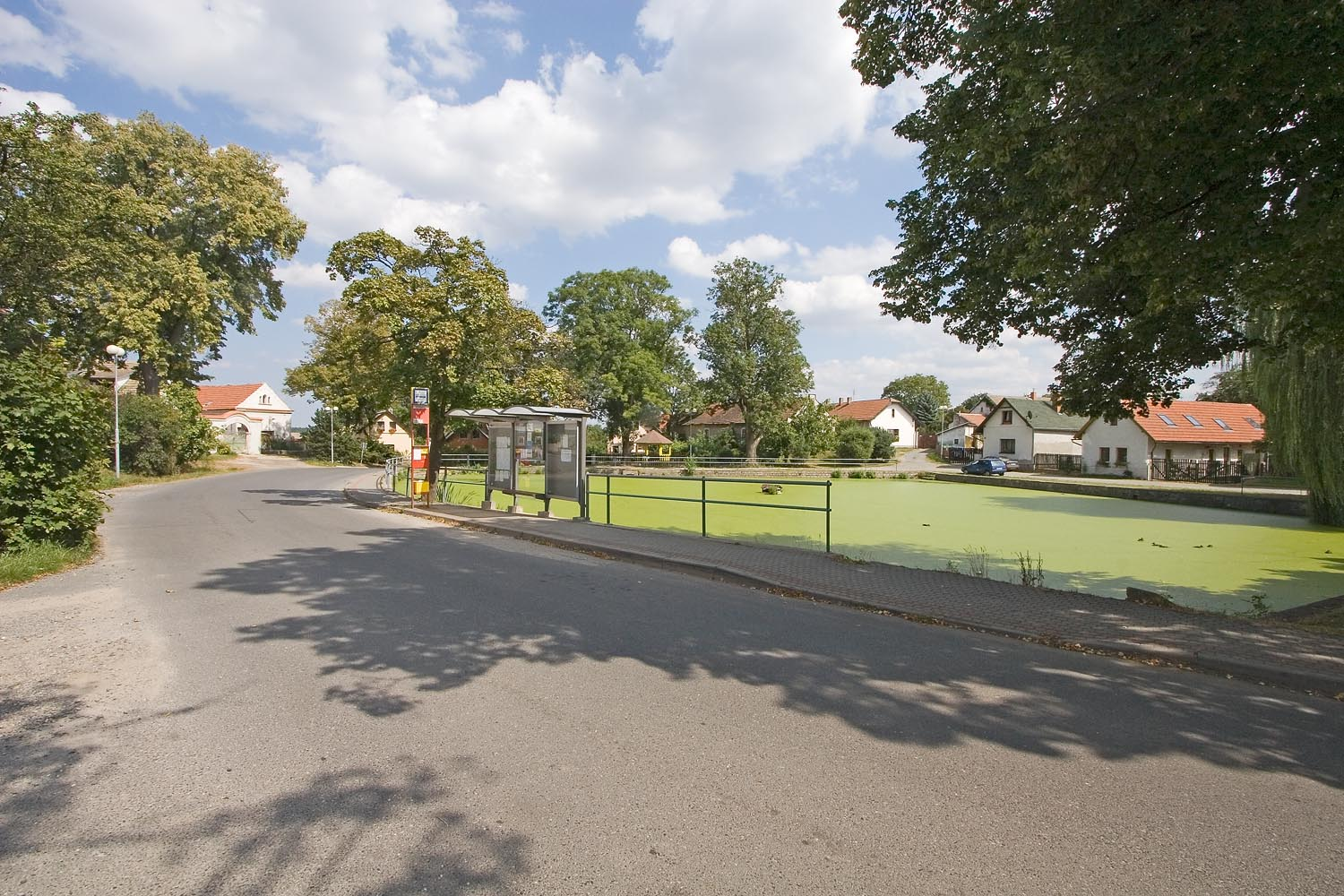 Tehovec - návesní rybník